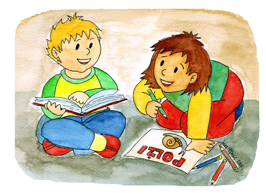 Ilustracija za spletne strani Knižnice OŠ Stična; tema: v knjižnici je dovoljeno...(slikanje, risanje in izdelava plakatov op.p.). Mešana tehnika (akvarel in tuš), zasebna last: D.P. - E.; Illustration for web sites of OŠ Stična Library; In library it is allow... (painting, drawing and making posters). Watercolour and ink. Private property: D.P. - E.